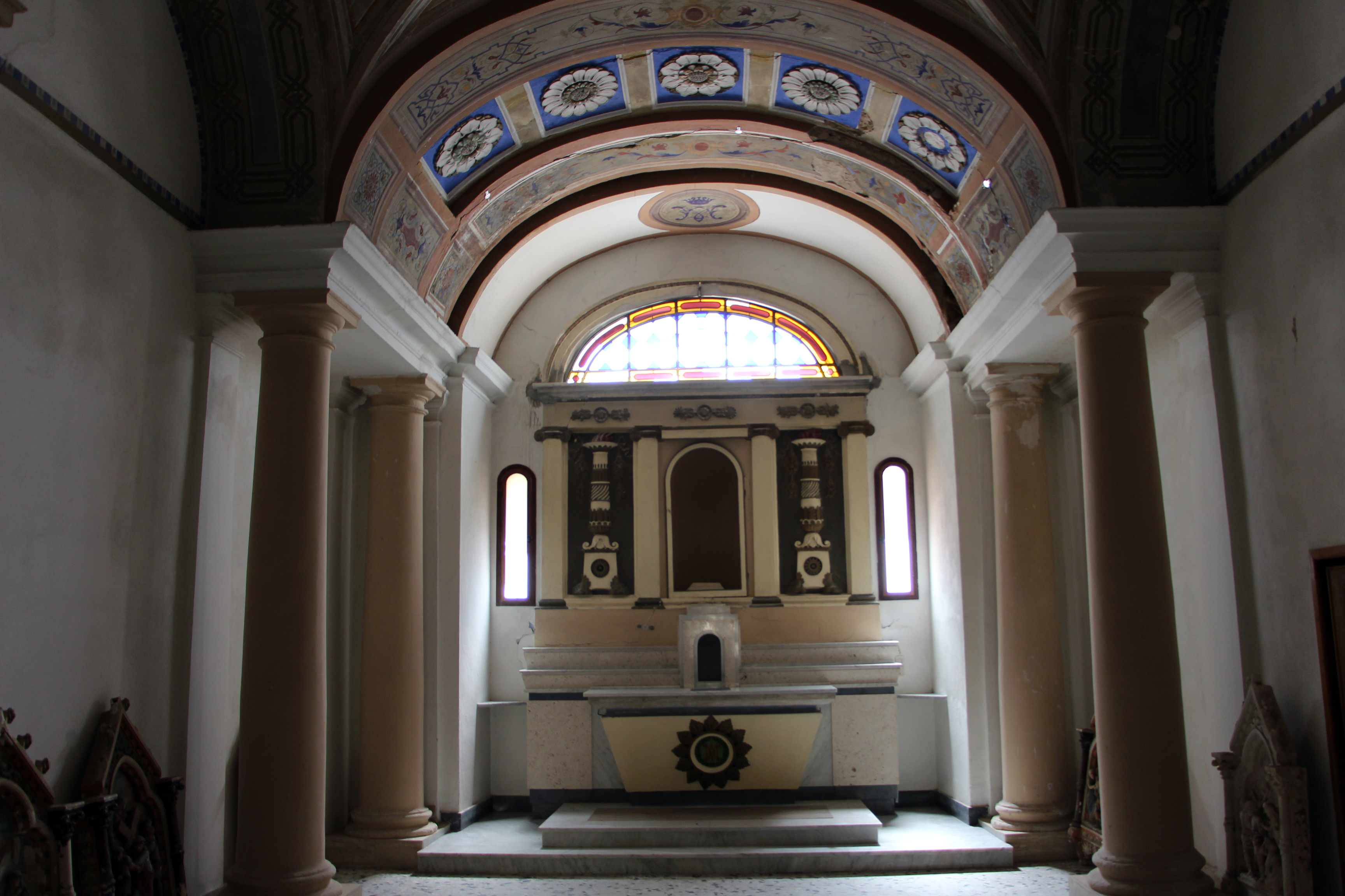 Ozieri